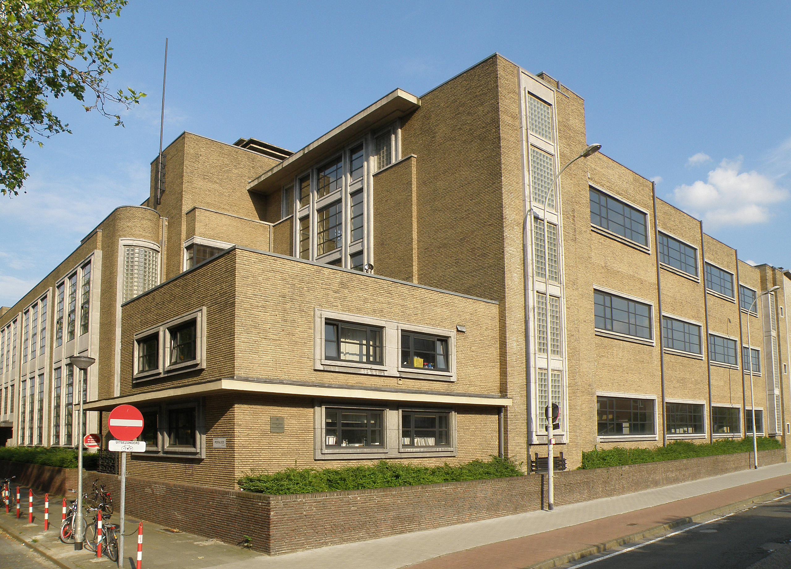 Anvers, Belgique. Etablissement scolaire, sis angle Pestalozzistraat (à gauche)/Jan De Voslei (à droite). Archit. Emile Van Averbeke, 1930.